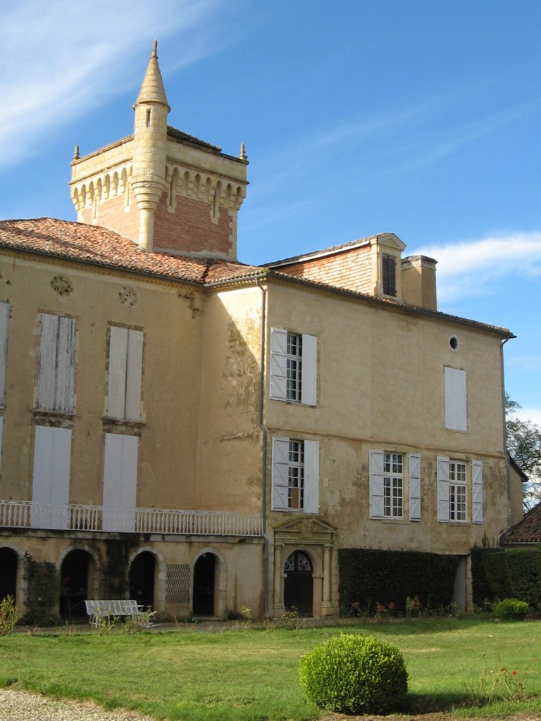 Château de Latour (InscriptionClassement) .